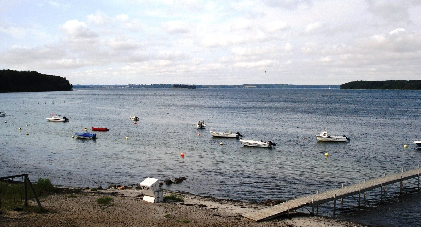 Kleiner_Belt_-_Gammel_Aalbo_-_Festland_-_Fænø_Kalv_-_Fænø